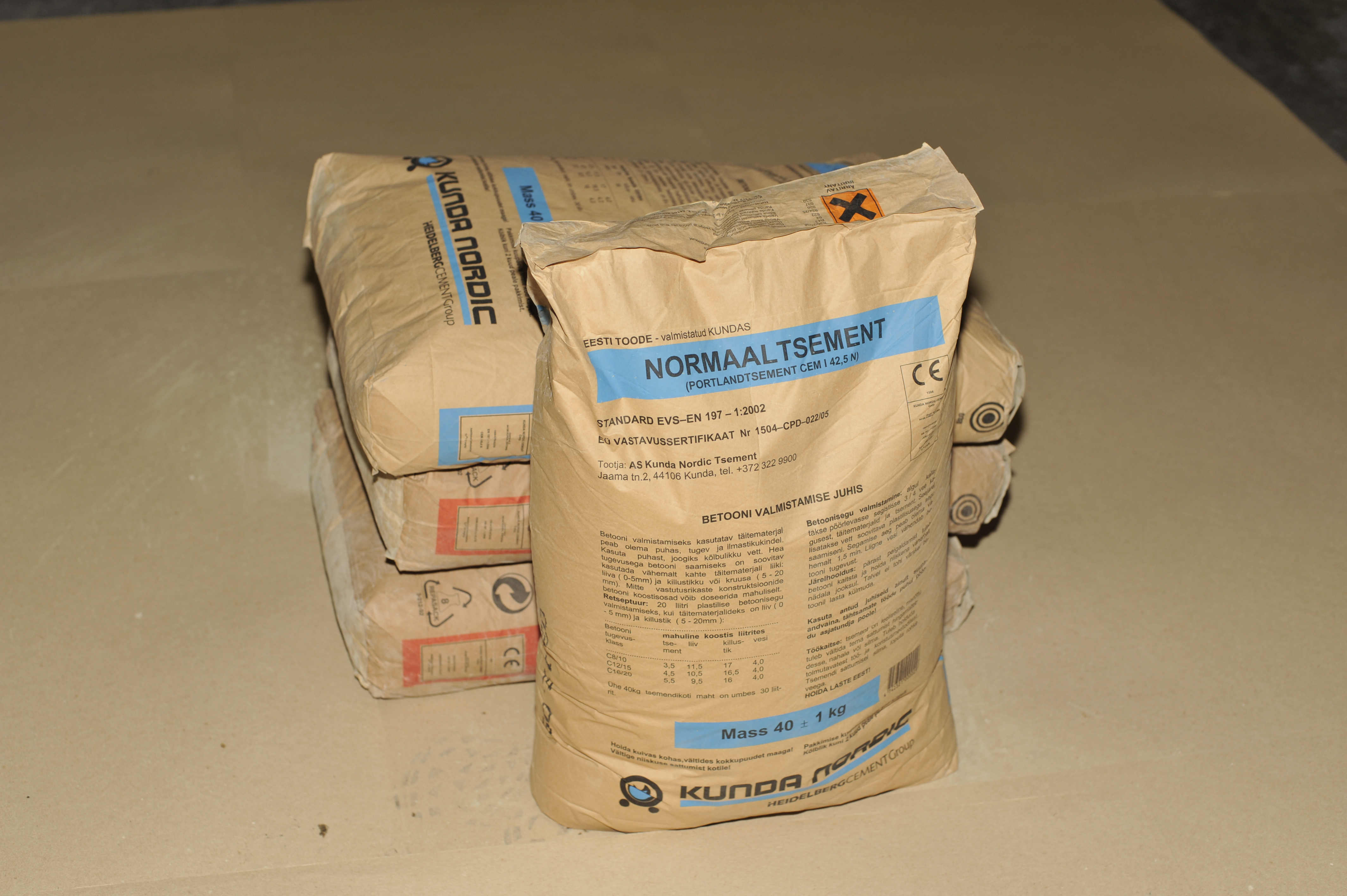 Kundas valmistatud tsement.